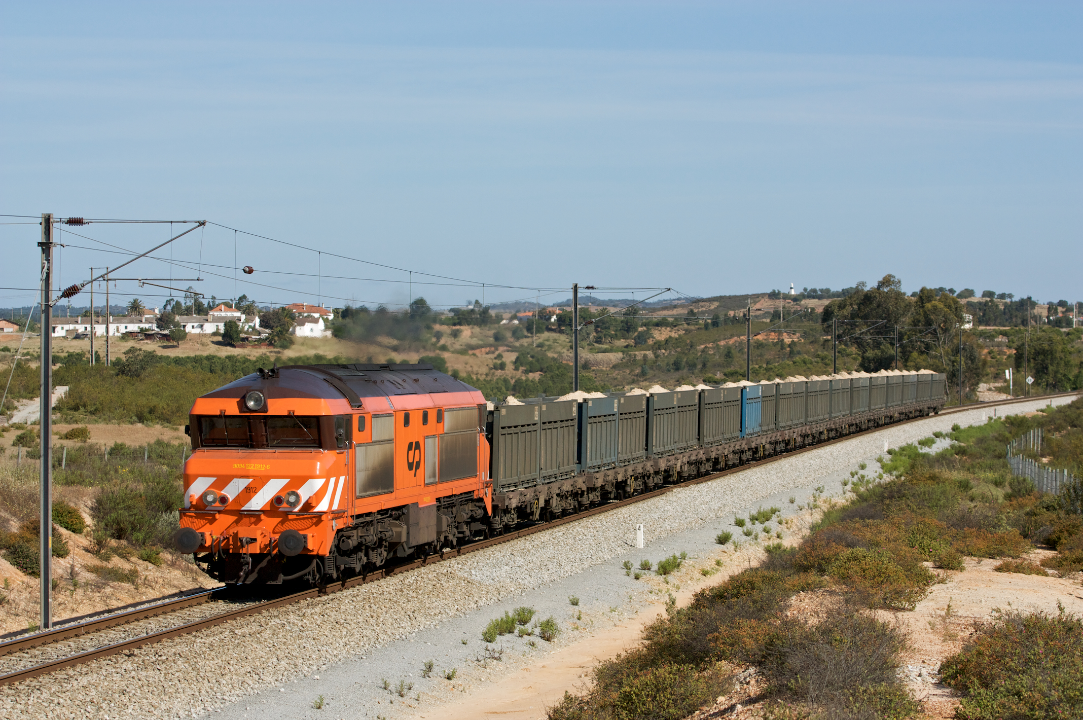 Tipo: Comboio de Transporte de Areia 68081 [Ramal Somincor - Neves Corvo] Local: Lousal [Linha do Sul, PK 126] Data e hora: 19 de Maio de 2009 [09h41] Material: Locomotiva 1912 + 14 vagões CP Regmms (28 contentores Somincor) esta fotografia foi publicada no .